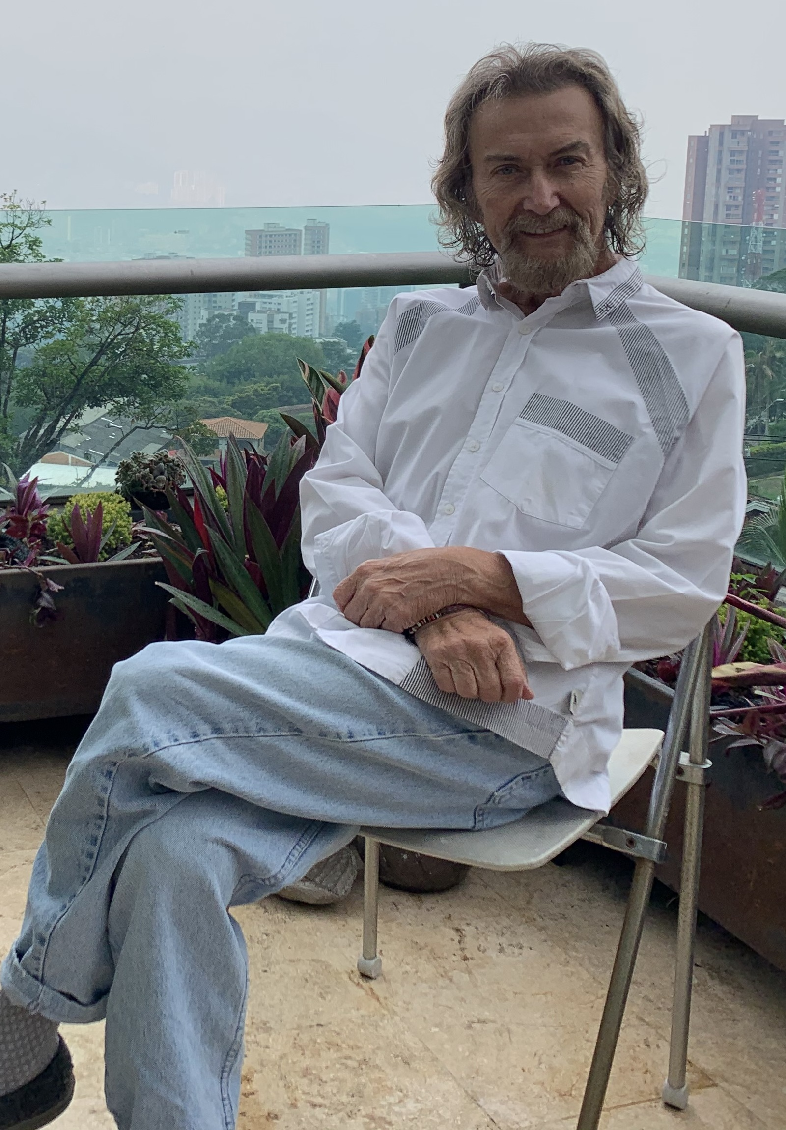 Diego Angel, founder of Rockstar San Diego